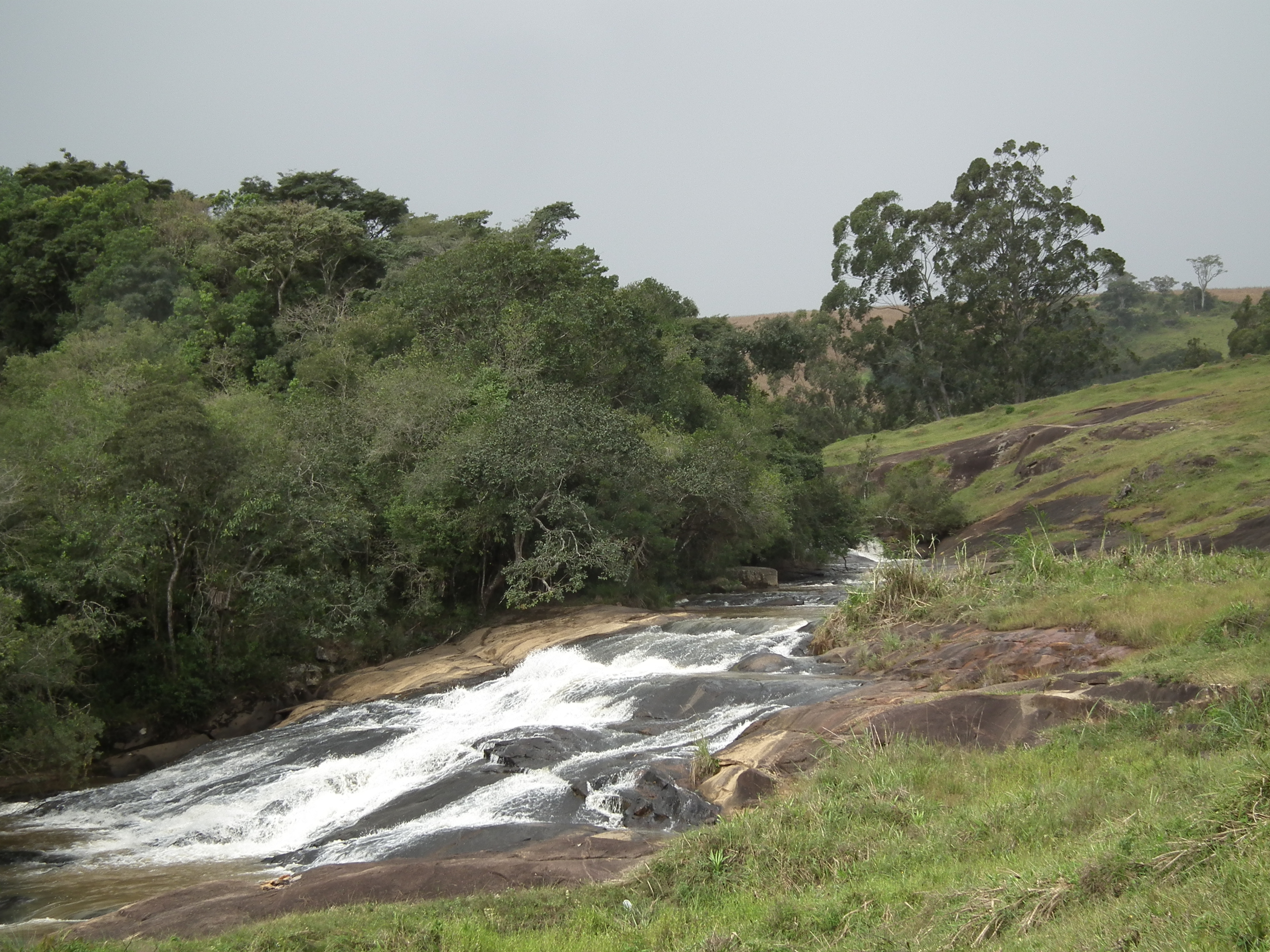 Choeira no Bairro Boca da Mata.